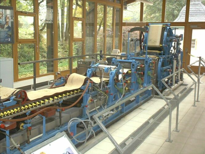 Uploader's original description "Papiermaschine, eigenes Bild, GNU-FDL"